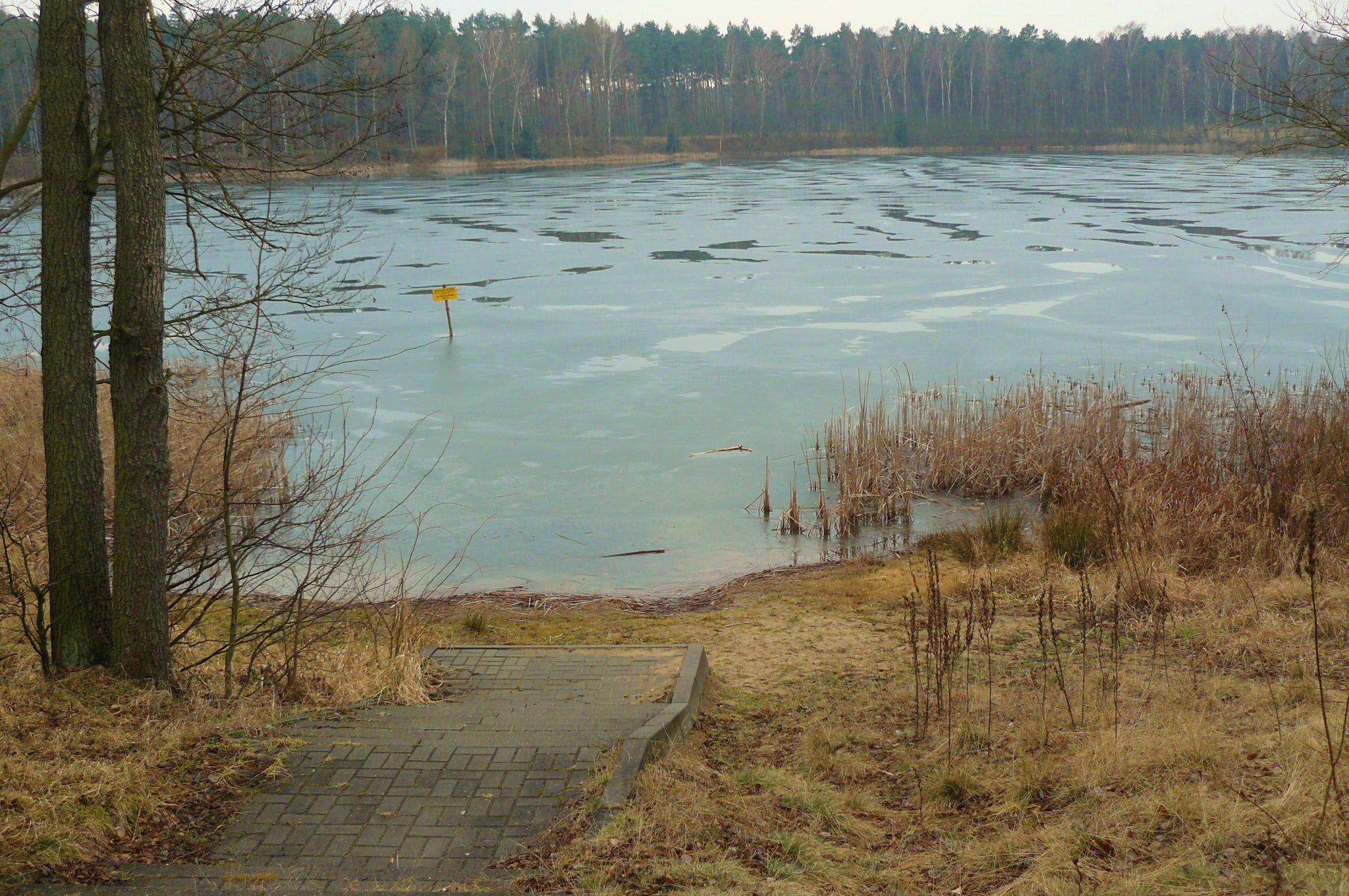 Jezioro Długie w gm. Drawsko (Puszcza Notecka).